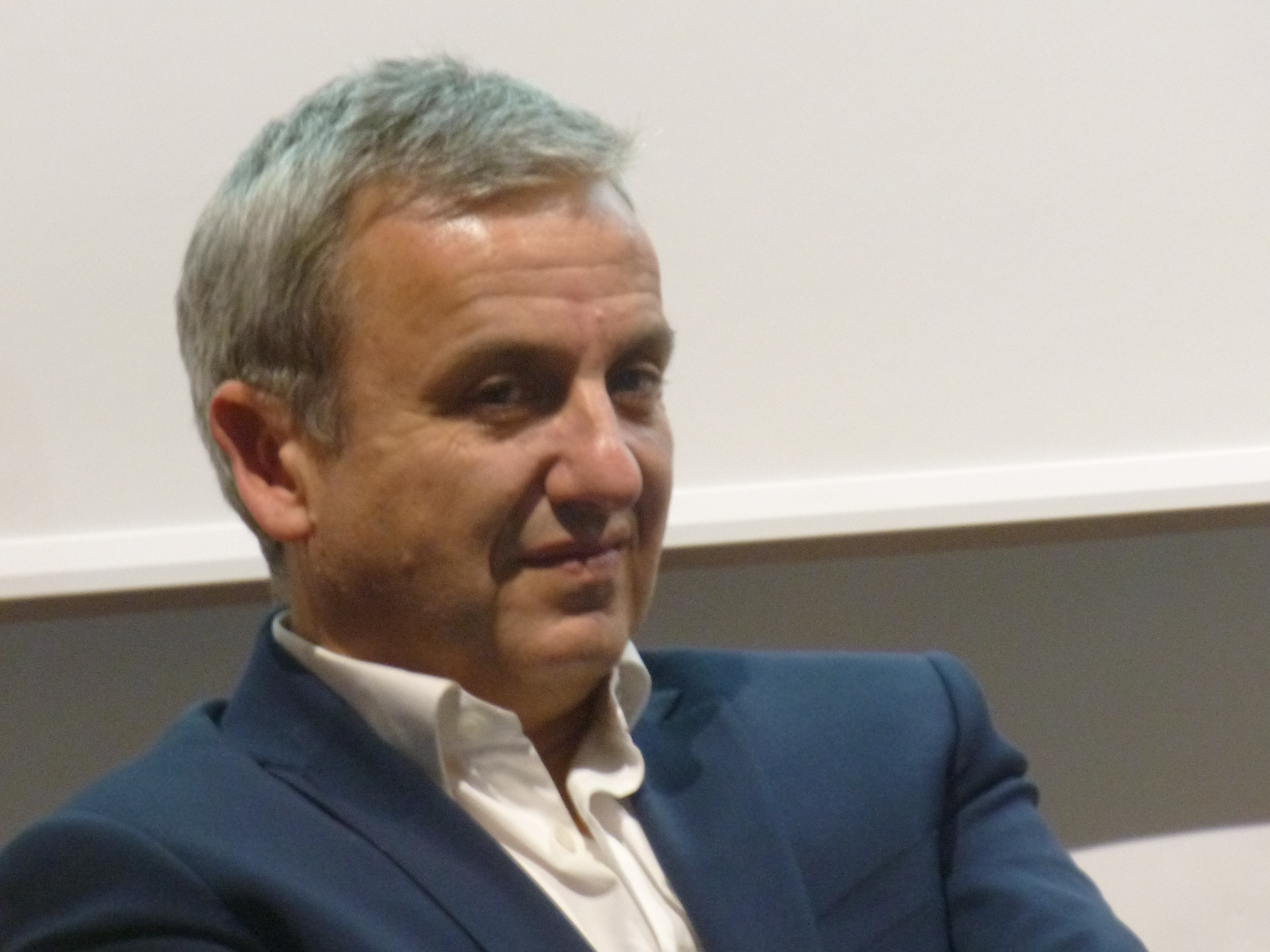 Gilles Rozier 2016 Auslandsgesellschaft Dortmund